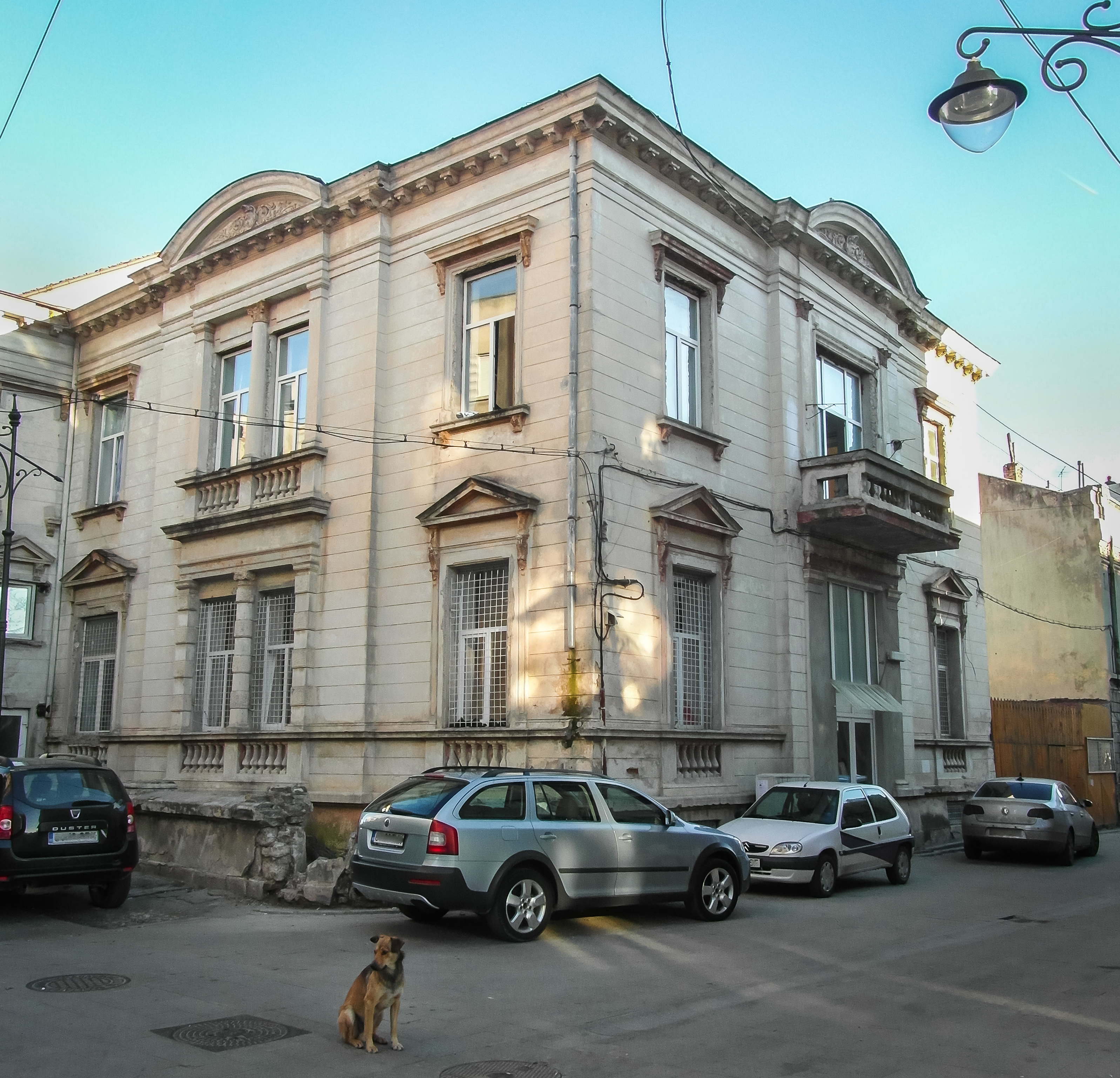 Casa se află pe Str. Nicolae Titulescu 17 din Constanța.